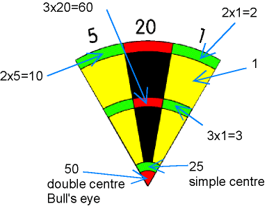 secteur cible flechette